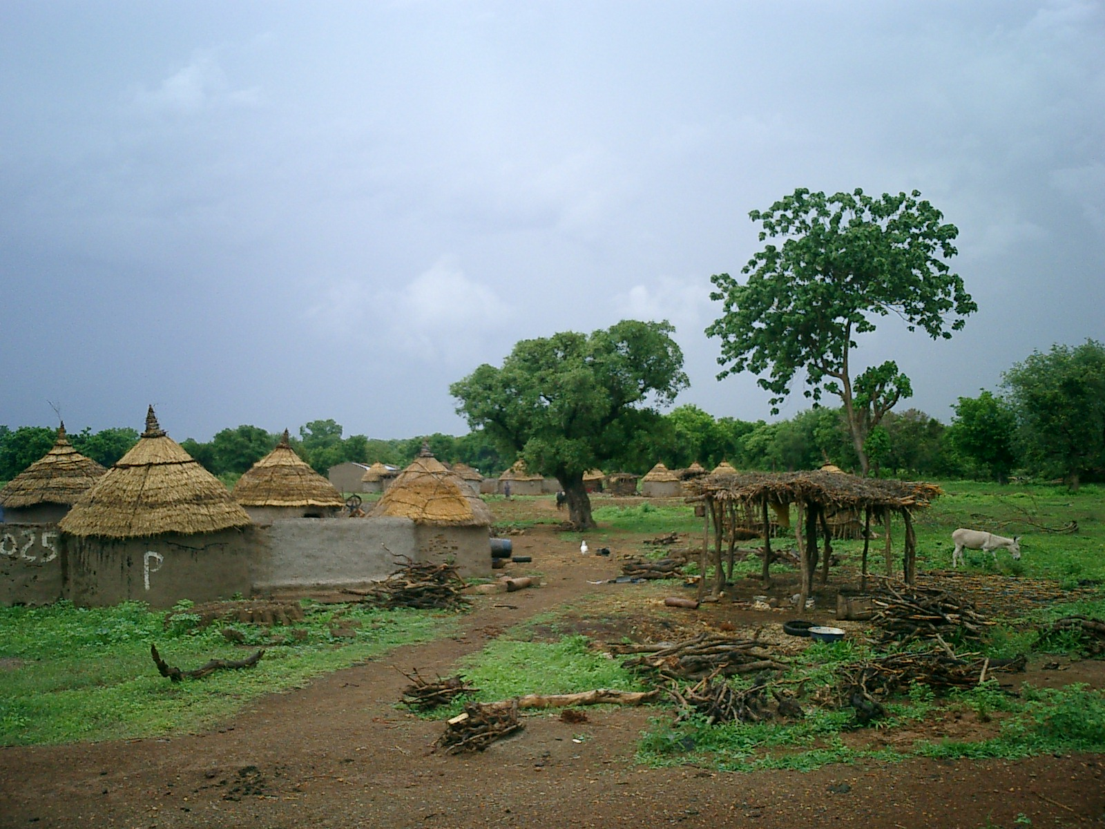 lalgaye village in burkina faso